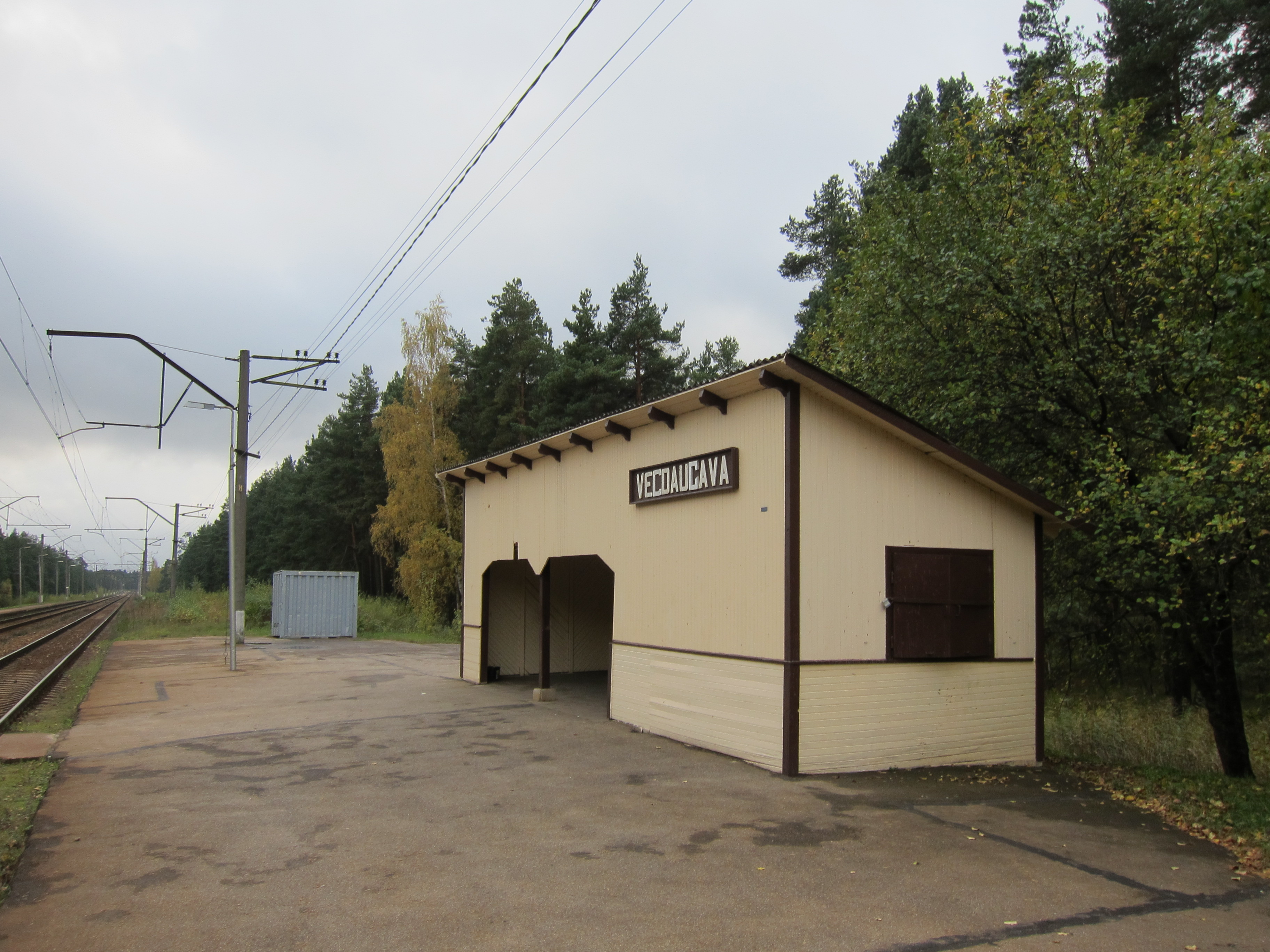 Vecdaugavas stacijas ēka (nojume)